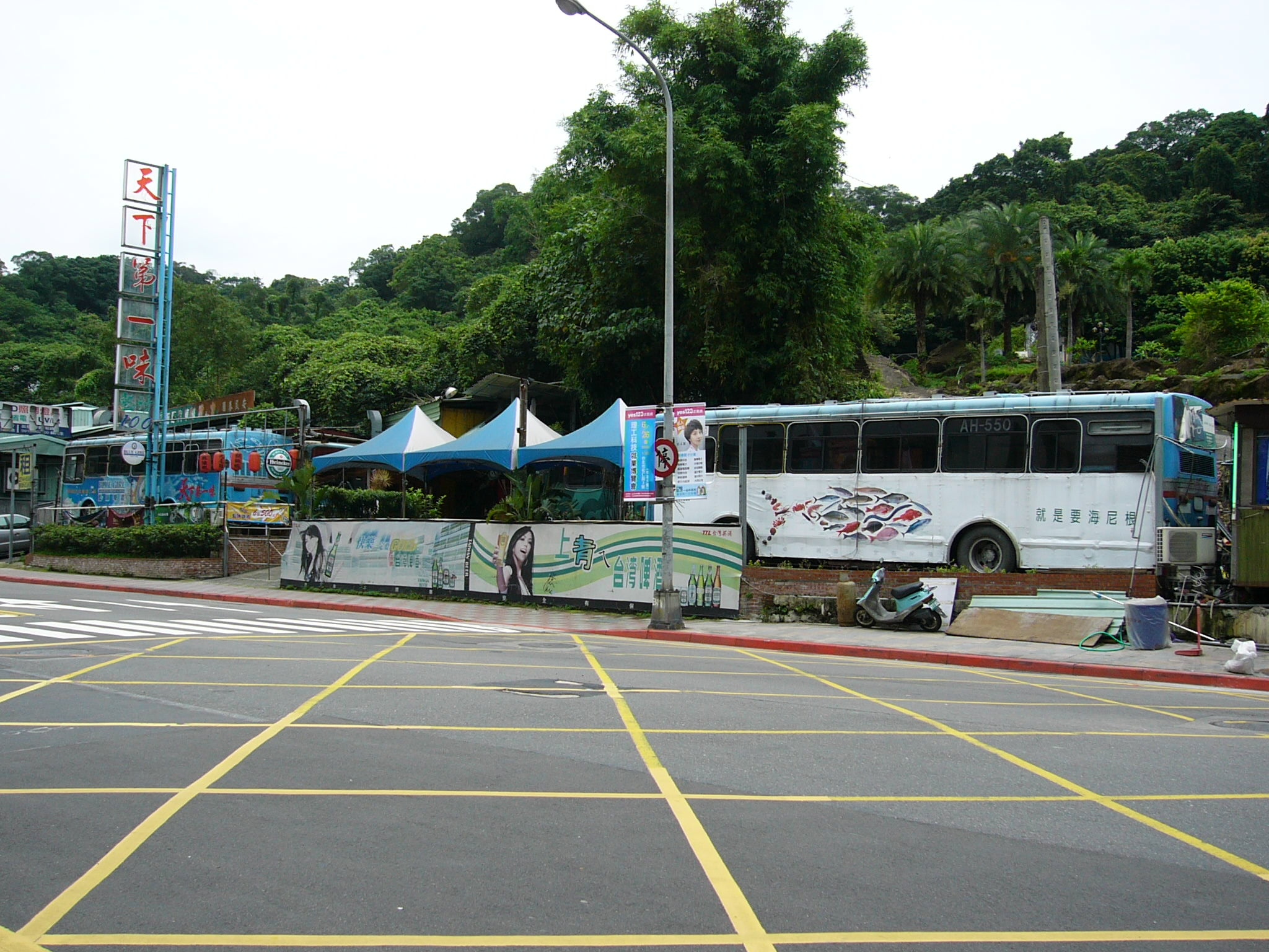 欣欣客運已淘汰的Isuzu LT133L冷氣空調車被台北市內湖區天下第一味海鮮公車餐廳收購作為佈景，外觀為第一代塗裝。